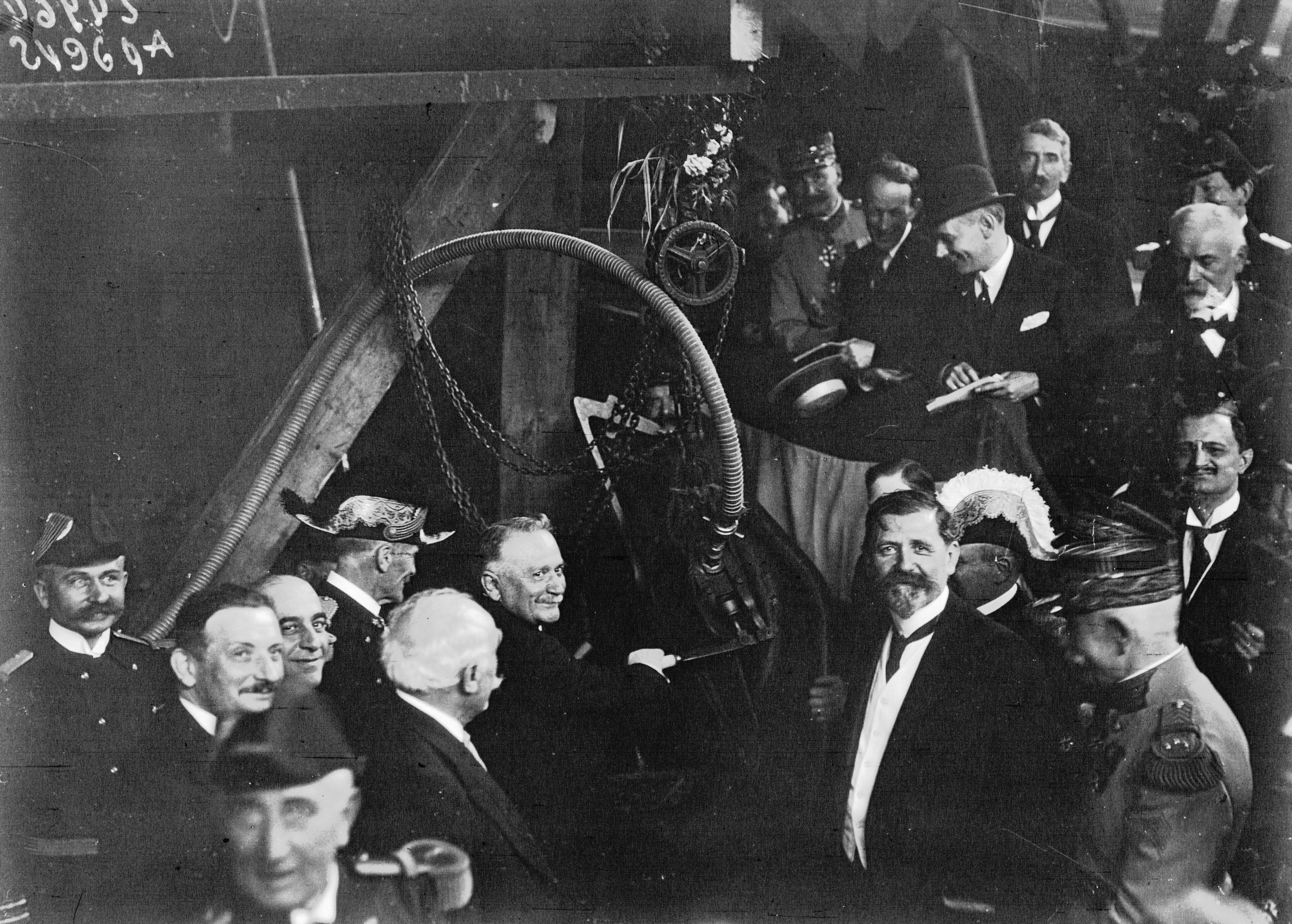 Gaston Doumergue pose le 1er rivet au sous marin Redoutable